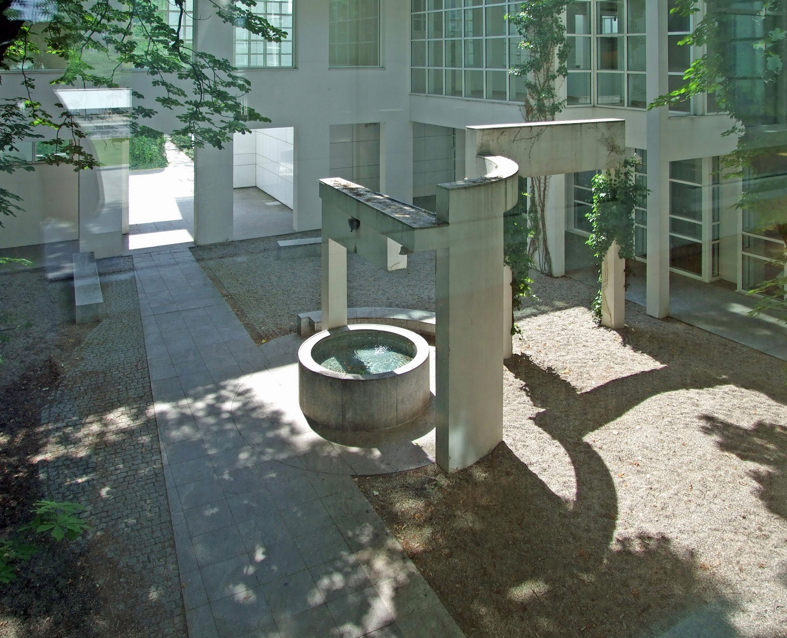 Blick von innen auf den Hof des Museums für Angewandte Kunst in Ffm